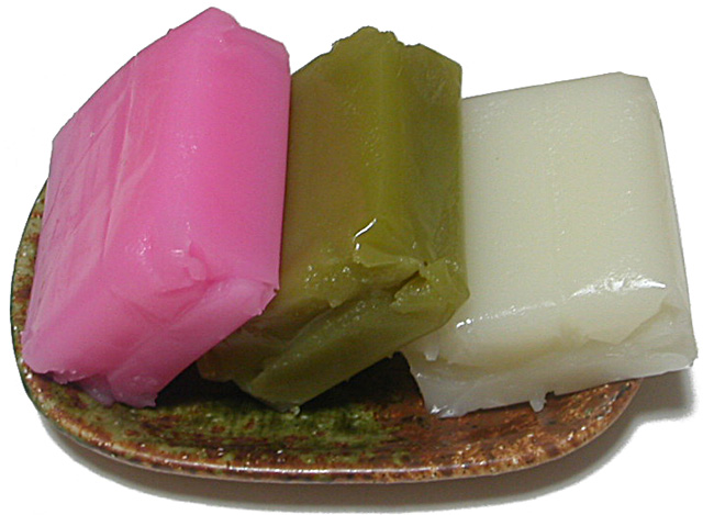 大須ういろ。さくら、抹茶、白の一口ういろです。